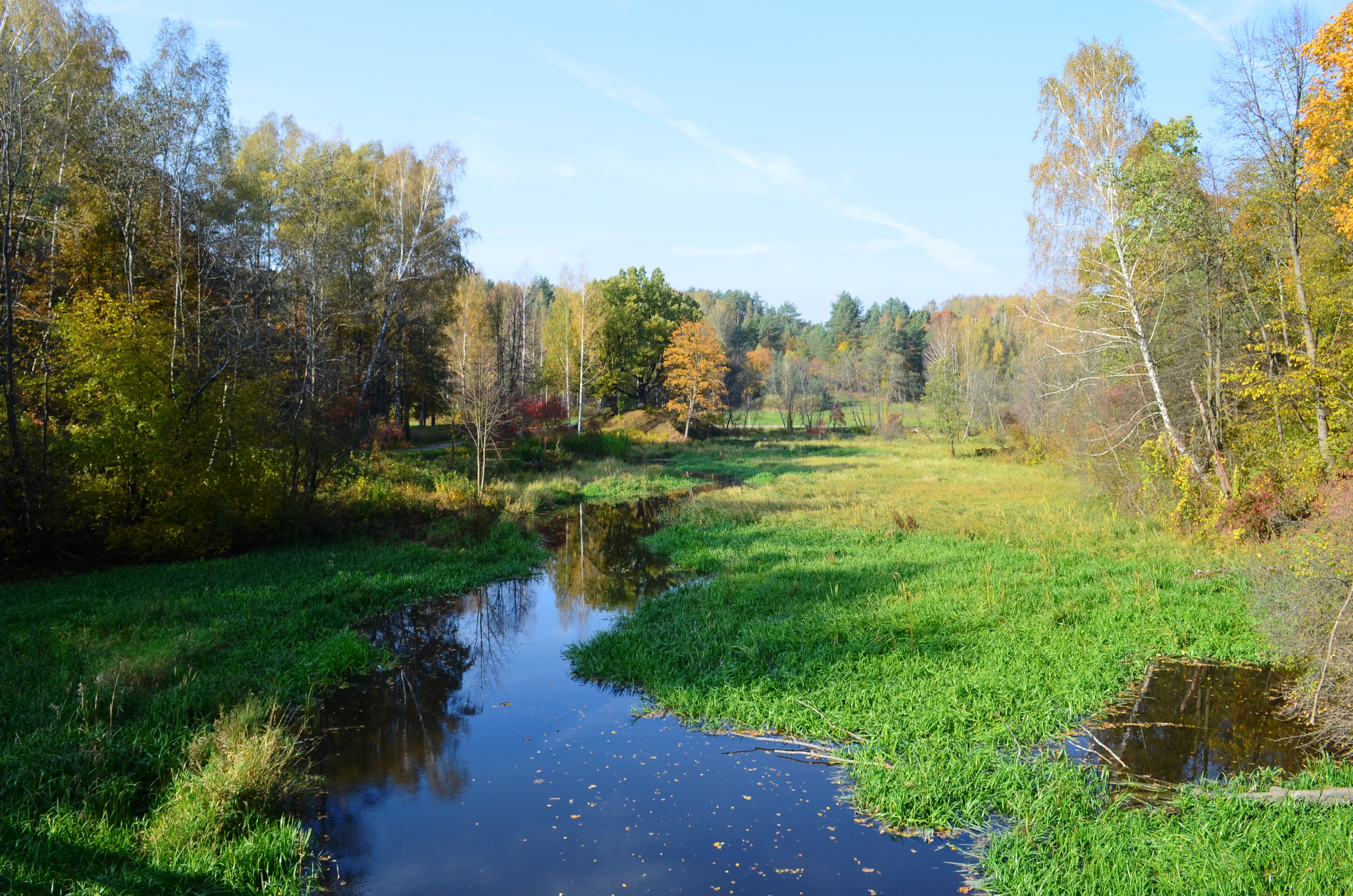 Praviena Rumšiškių LLBM teritorijoje